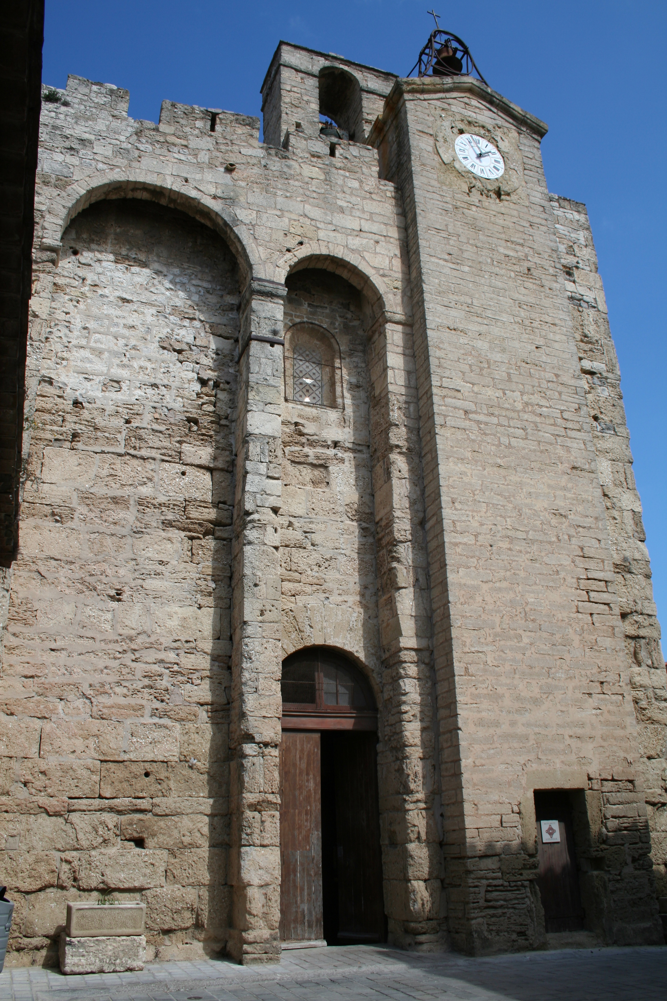 Vic-la-Gardiole (Hérault)- Sainte-Léocadie (église romane fortifiée du XIIe siècle)